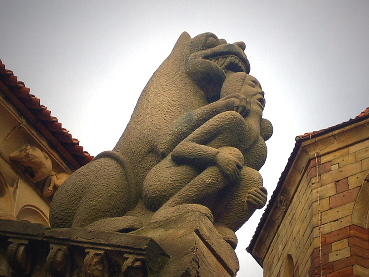 Monstre surmontant un homme, église Saints-Pierre-et-Paul de Rosheim. Copie de l'original déposé à l'Office de Tourisme.